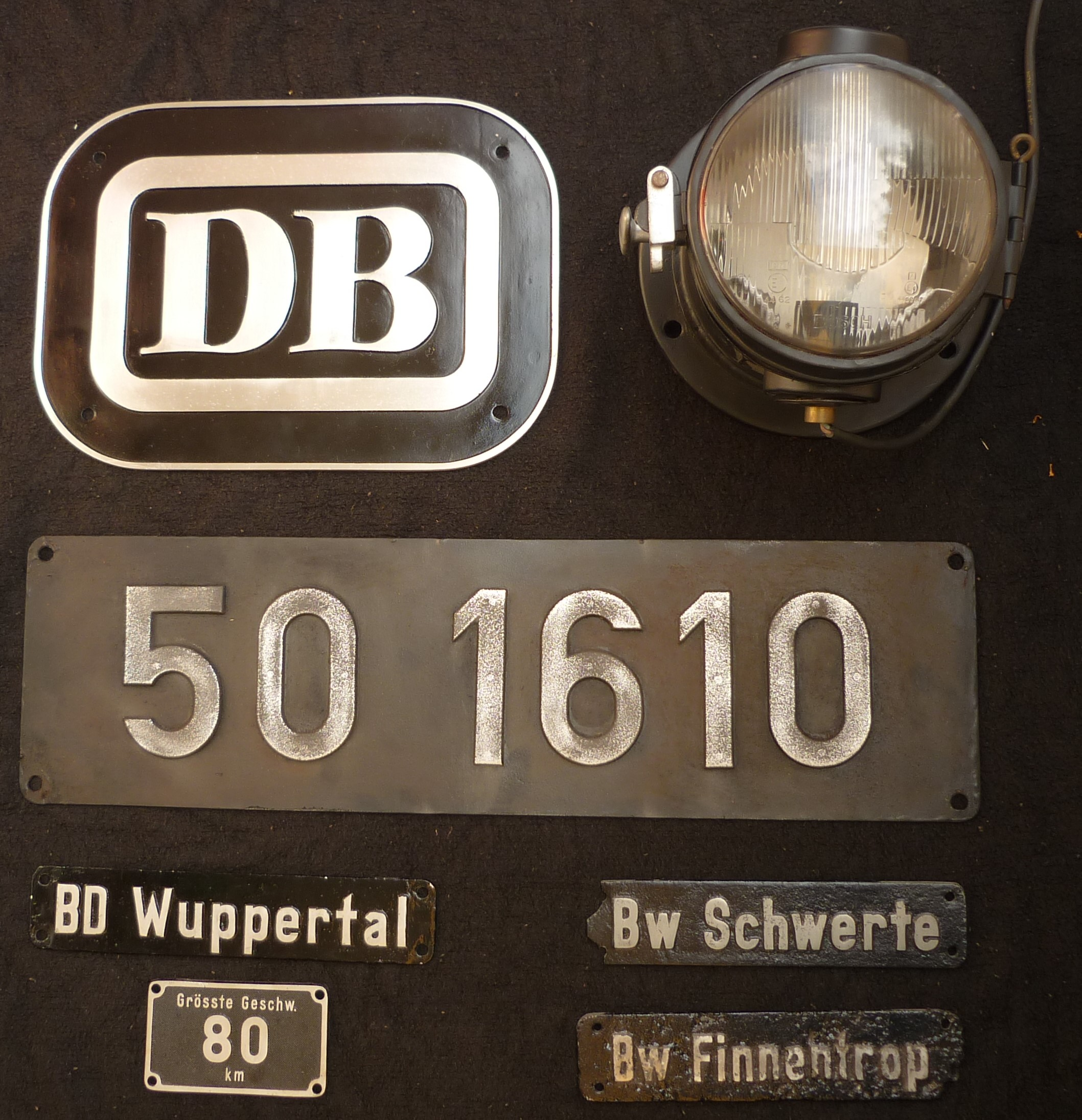 Typenschild, Stationierung Bahndirektion und Bahnbetriebswerk